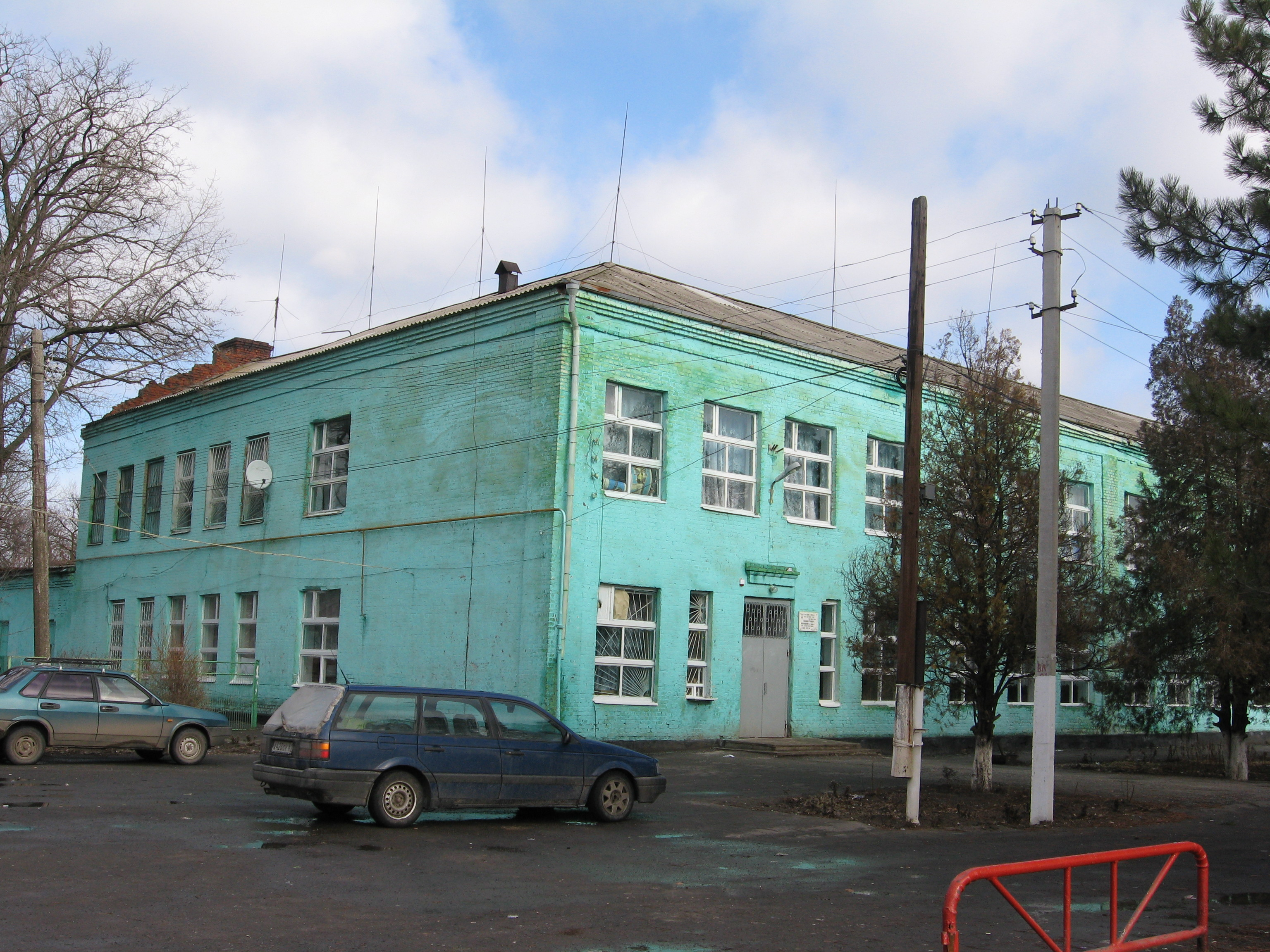 МБОУ СОШ №1 с. Самарского